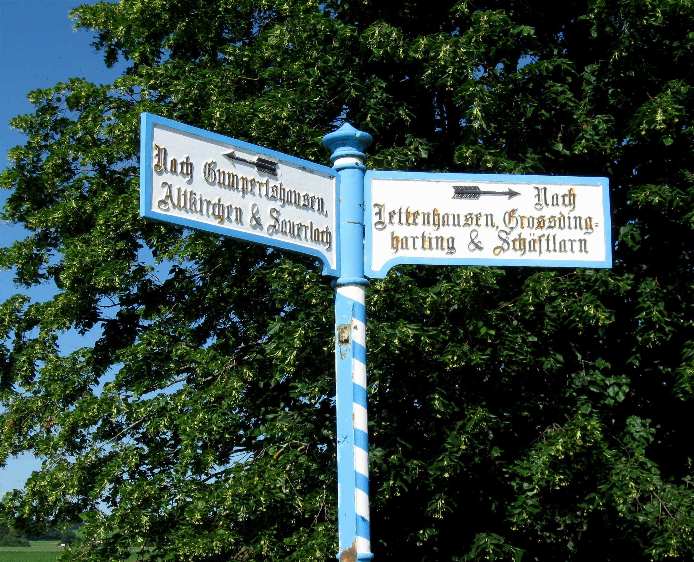 Gerblinghausen; Wegweiser; Gusseisen, um 1860/70; südlich des Orts neben der Straßenabzweigung nach Gumpertshausen